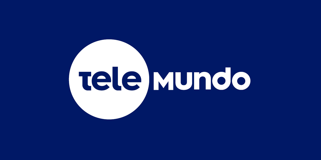 Grafica Telemundo, informativo de teledoce